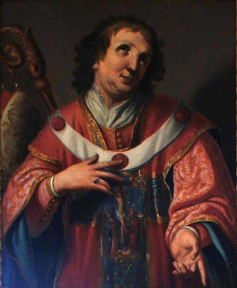 Porträtgemälde von Philipp von der Pfalz, Fürstbischof von Freising, im Fürstengang zwischen Fürstbischöflicher Residenz und Freisinger Dom.